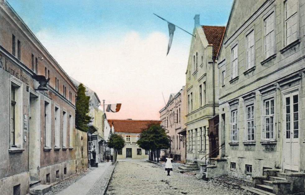 Дружба (Калининградская область)